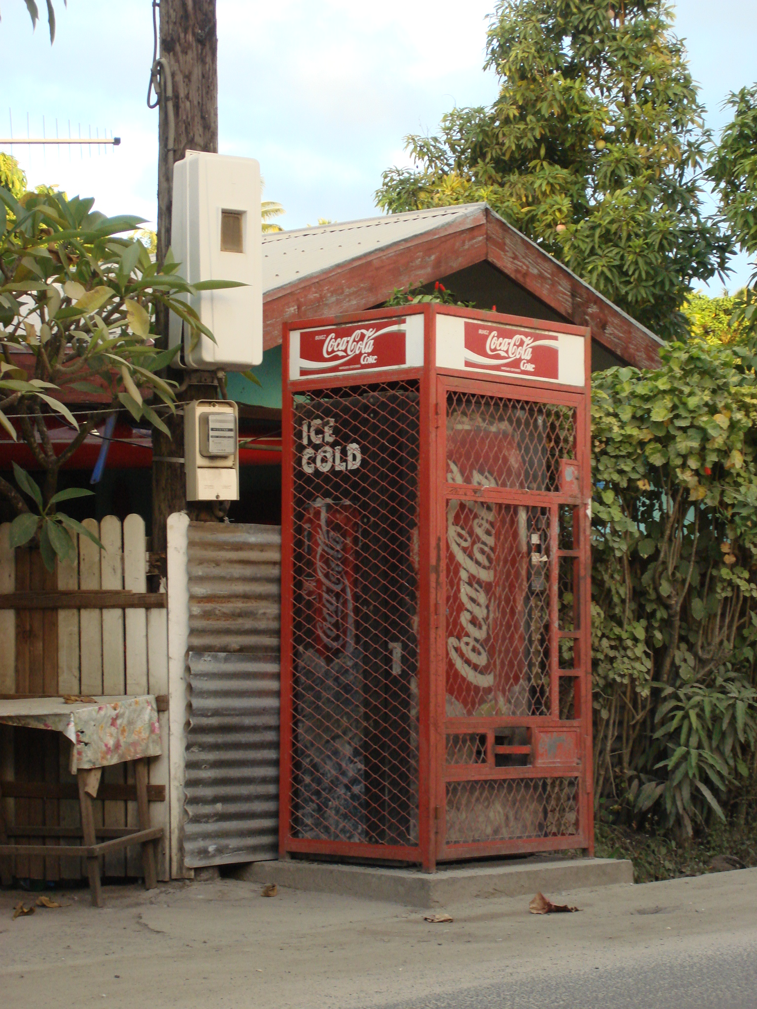 Coca-Cola Machine in Vaitape, Bora Bora